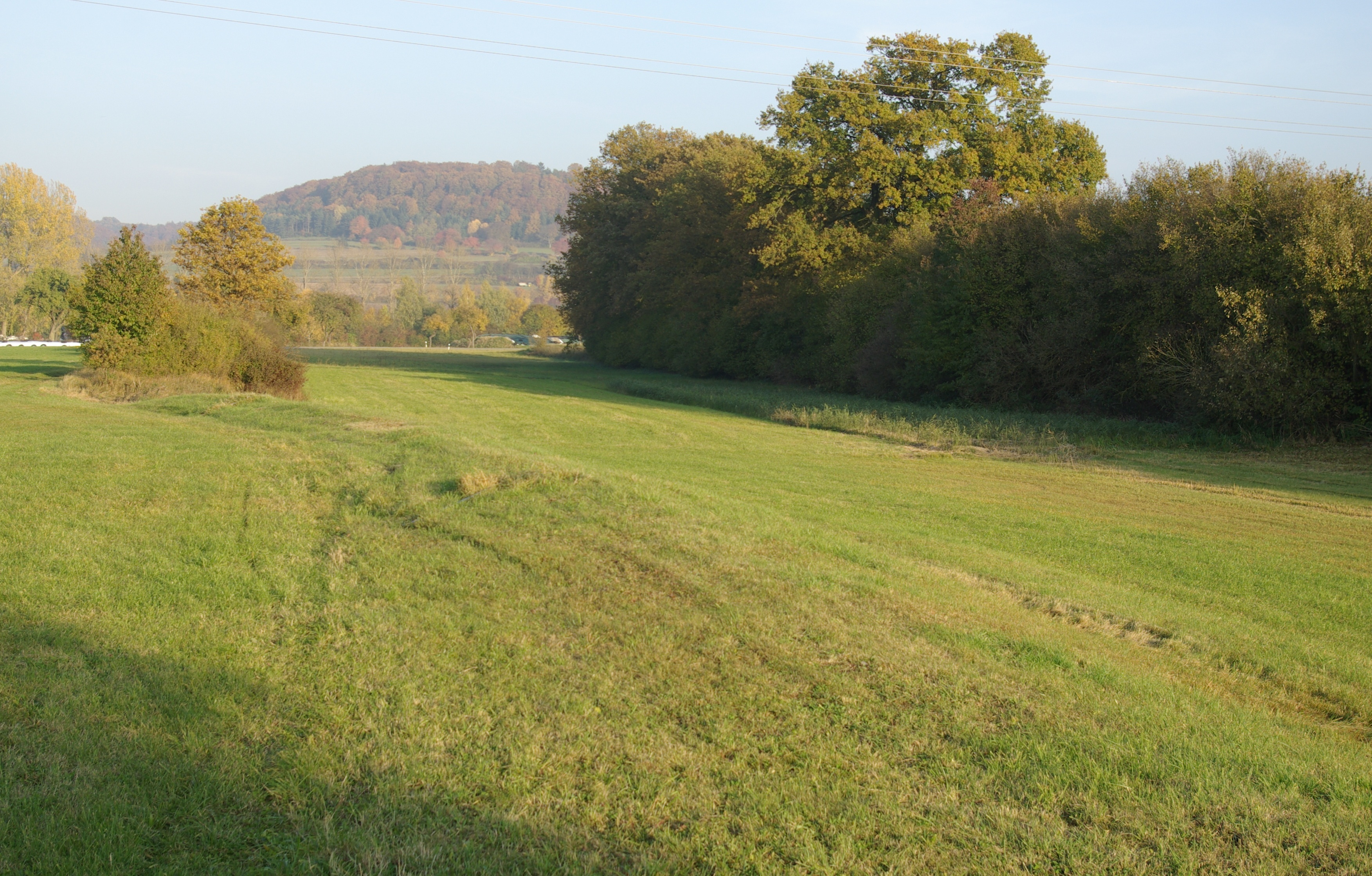 Fossa Carolina, nordöstlicher Abschnitt.